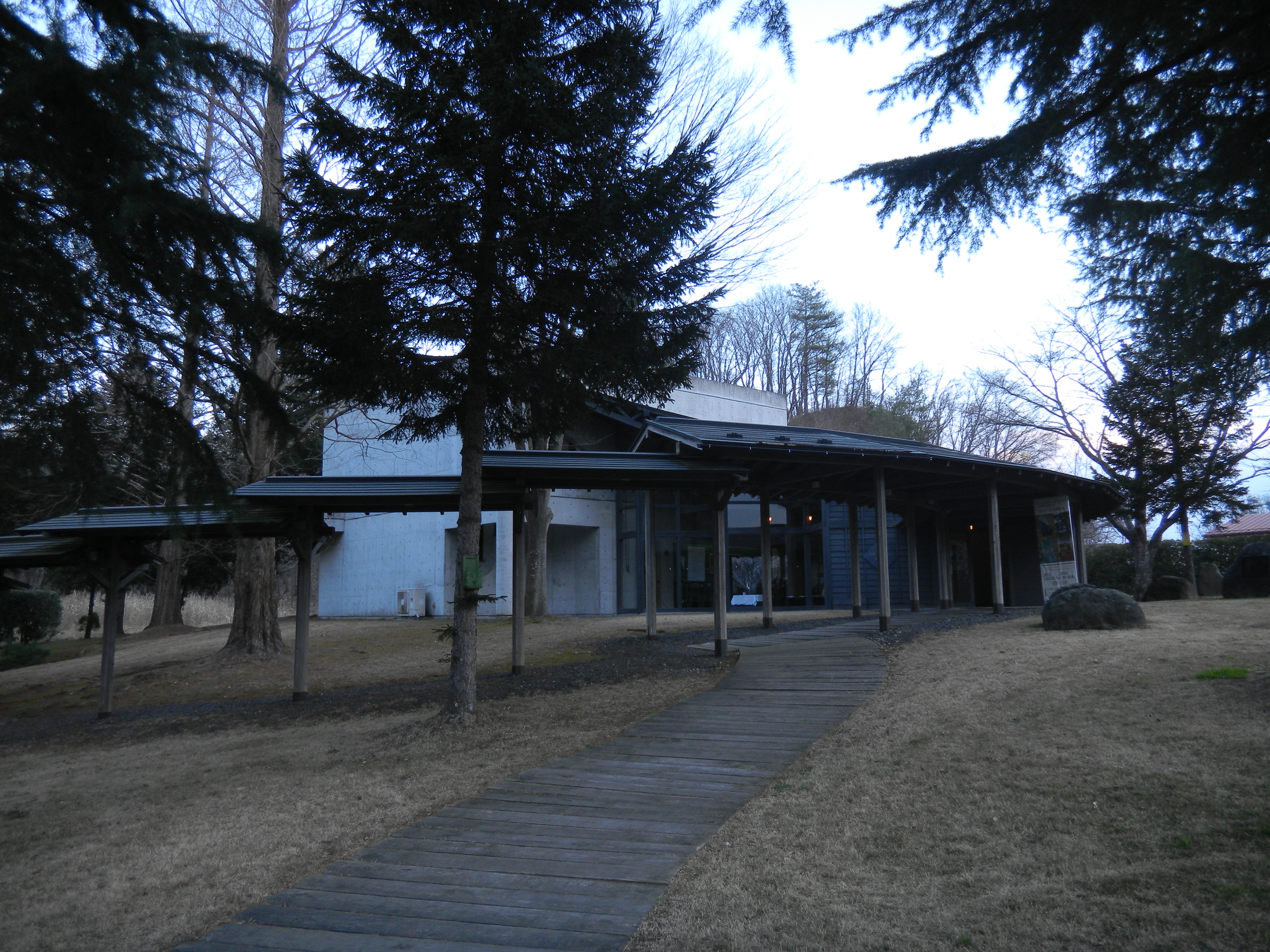 大衡村ふるさと美術館１